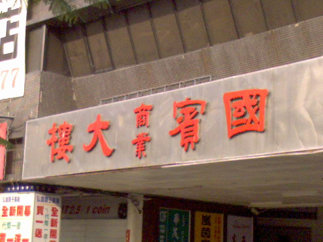 臺南市北區成功路，中華國賓商業大樓大門。